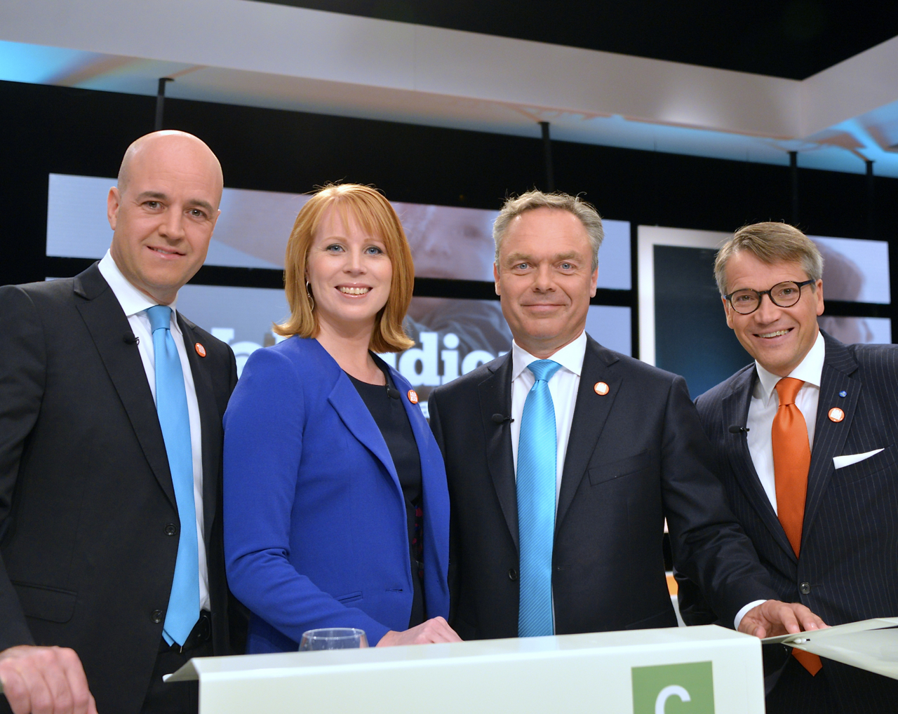 Alliansledarna efter den avslutande partiledardebatten i SVT den 12 september 2014.